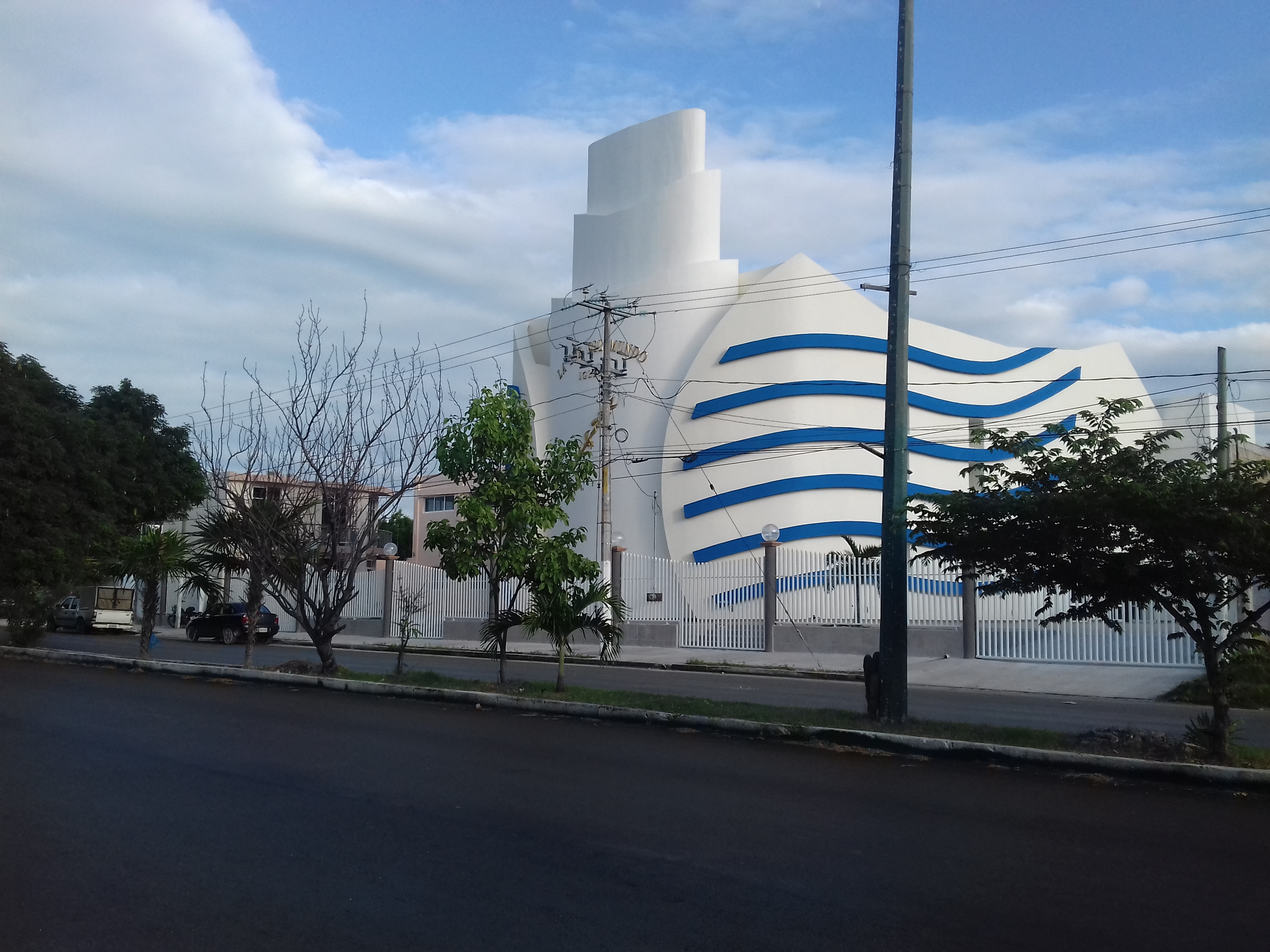 Foto de la Iglesia La Luz del Mundo Cancún Región 230.